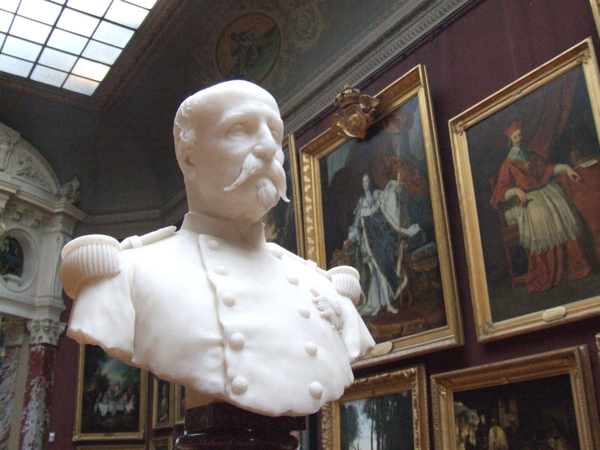 Buste de Henri d'Orléans (1822-1897) prince d'Orléans, Duc d'Aumale, situé dans la grande galerie du Château de Chantilly (Oise). Par Paul Dubois (1829-1905).